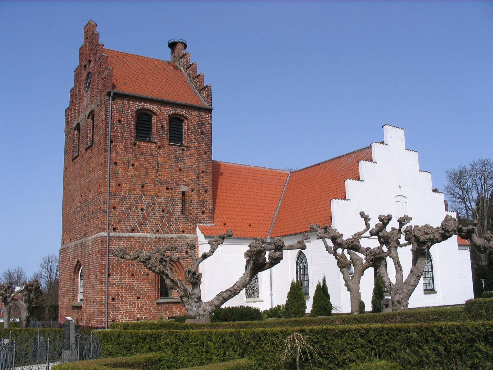 Søllerød Kirke